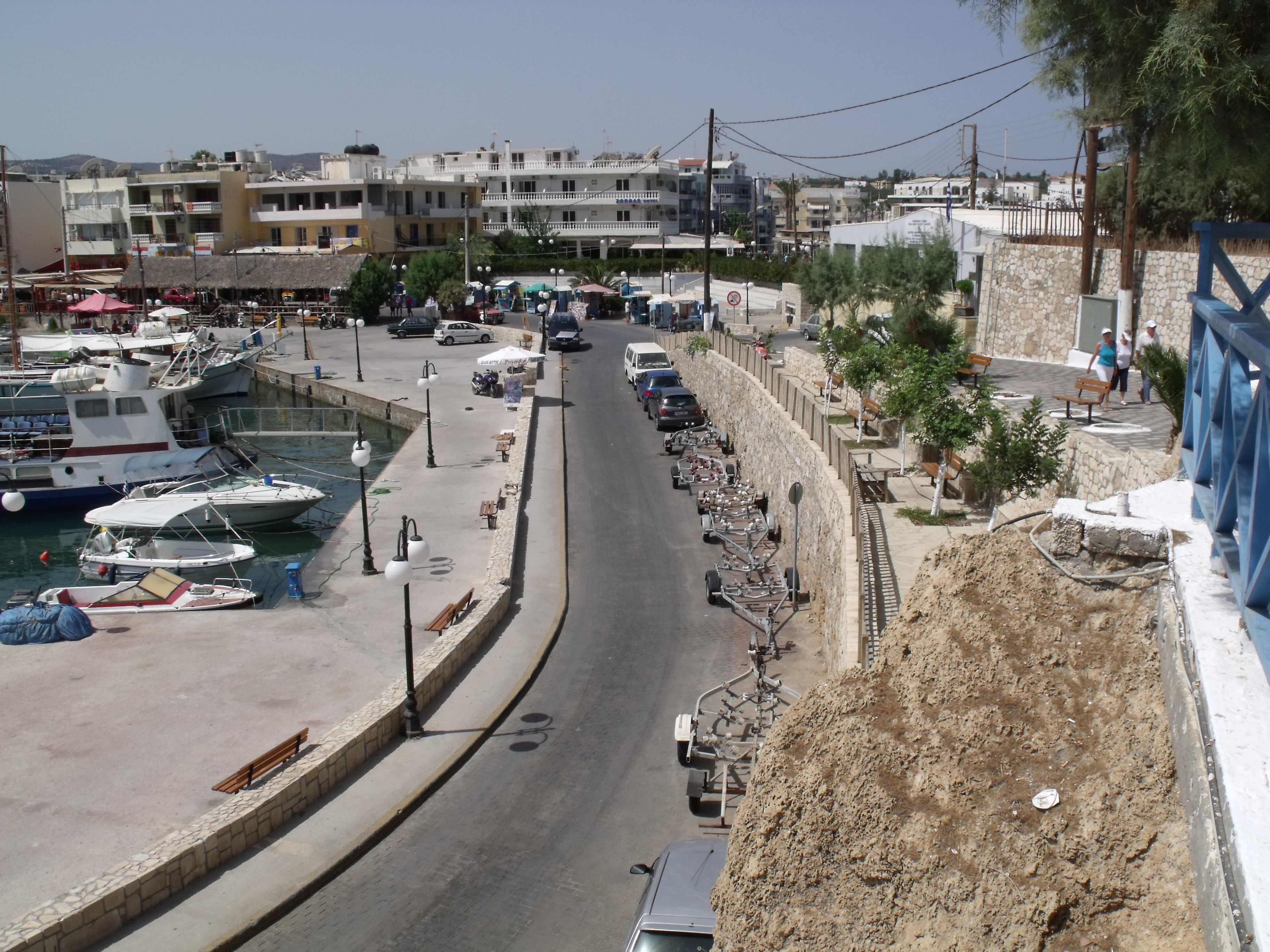 Kilátás a kápolnától / View from the chapel